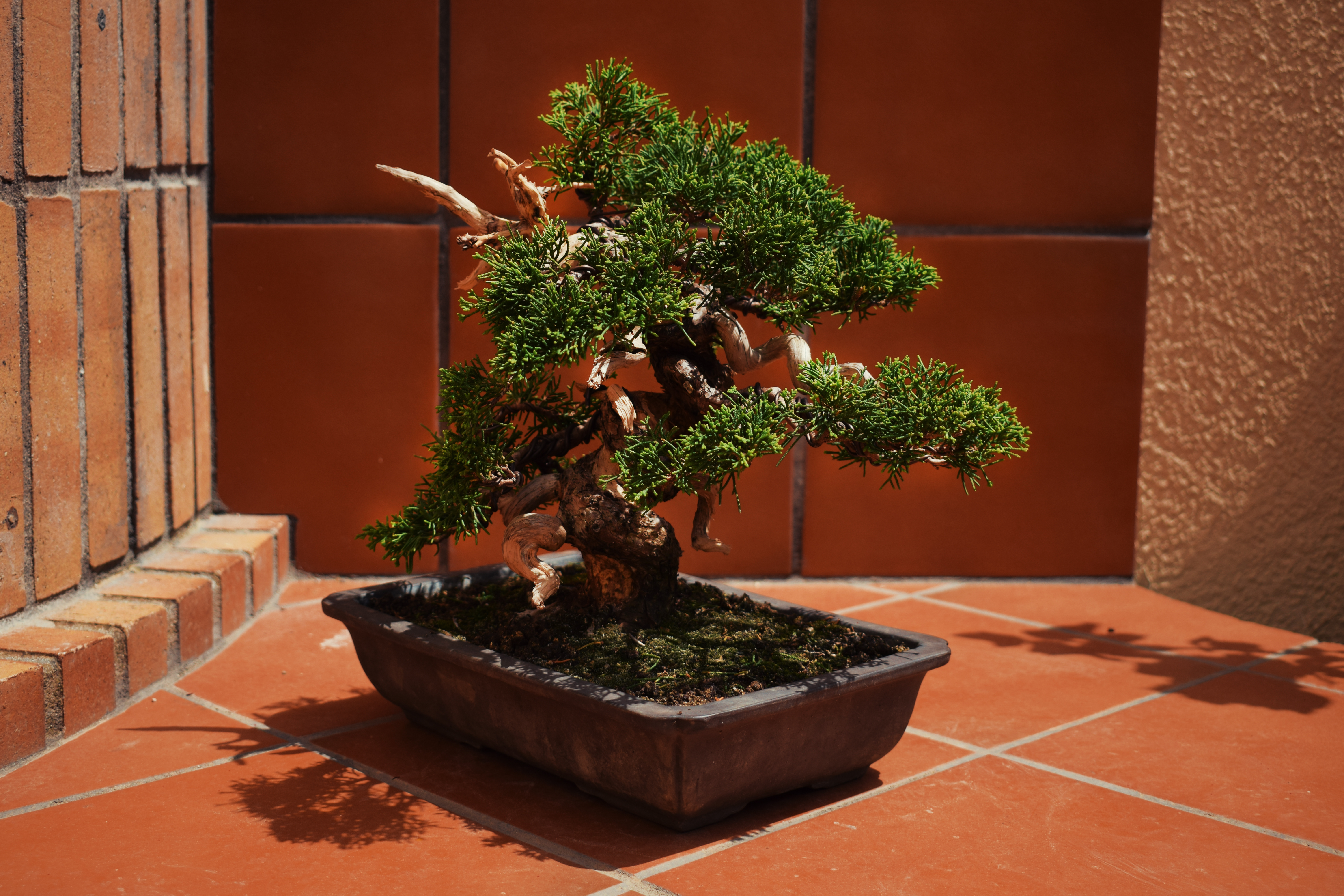 Bonsai Juniperus con Jin y madera trabajada